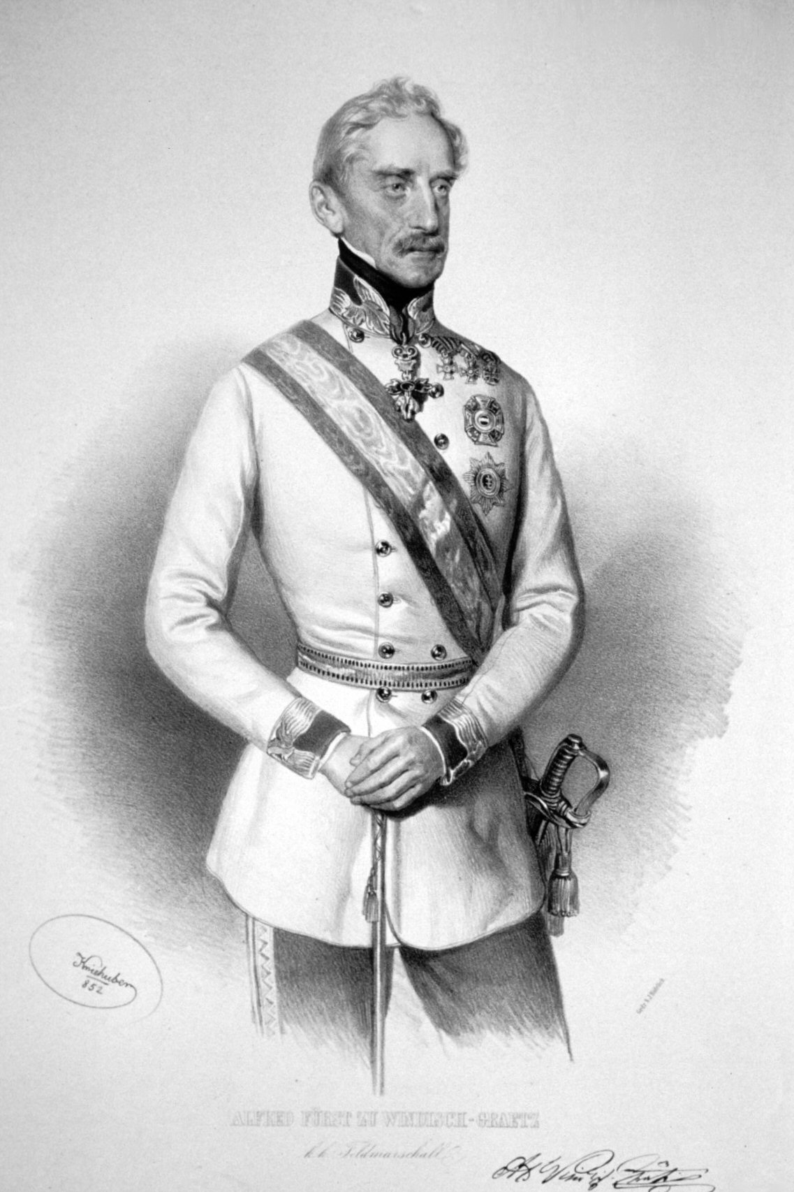 Alfred Fürst zu Windisch-Graetz (1787-1862), k. k. Feldmarschall.